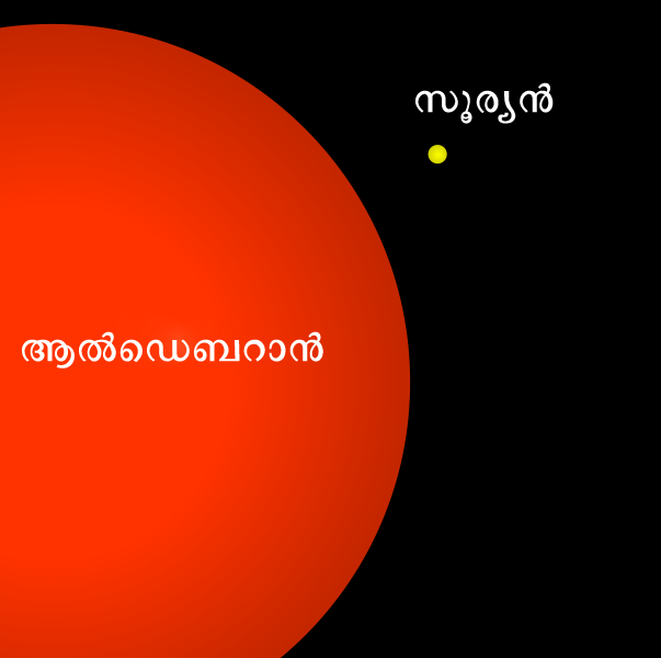 ആൽഡെബറാനിന്റെയും സൂര്യന്റെയും താരതമ്യേനയുള്ള വലിപ്പം